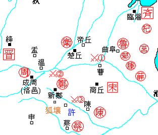 許国の位置